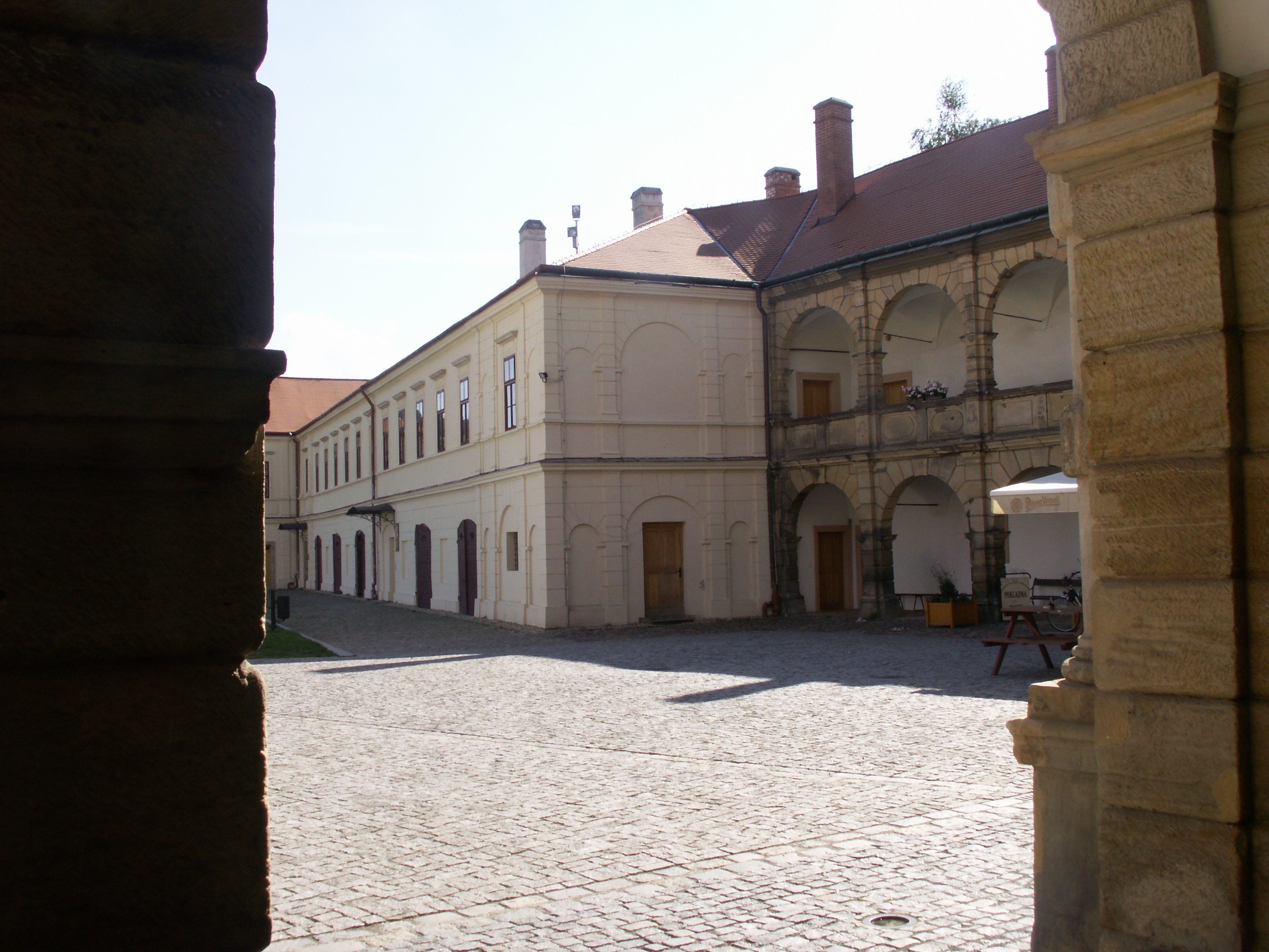 pravé křídlo zámku Moravská Třebová